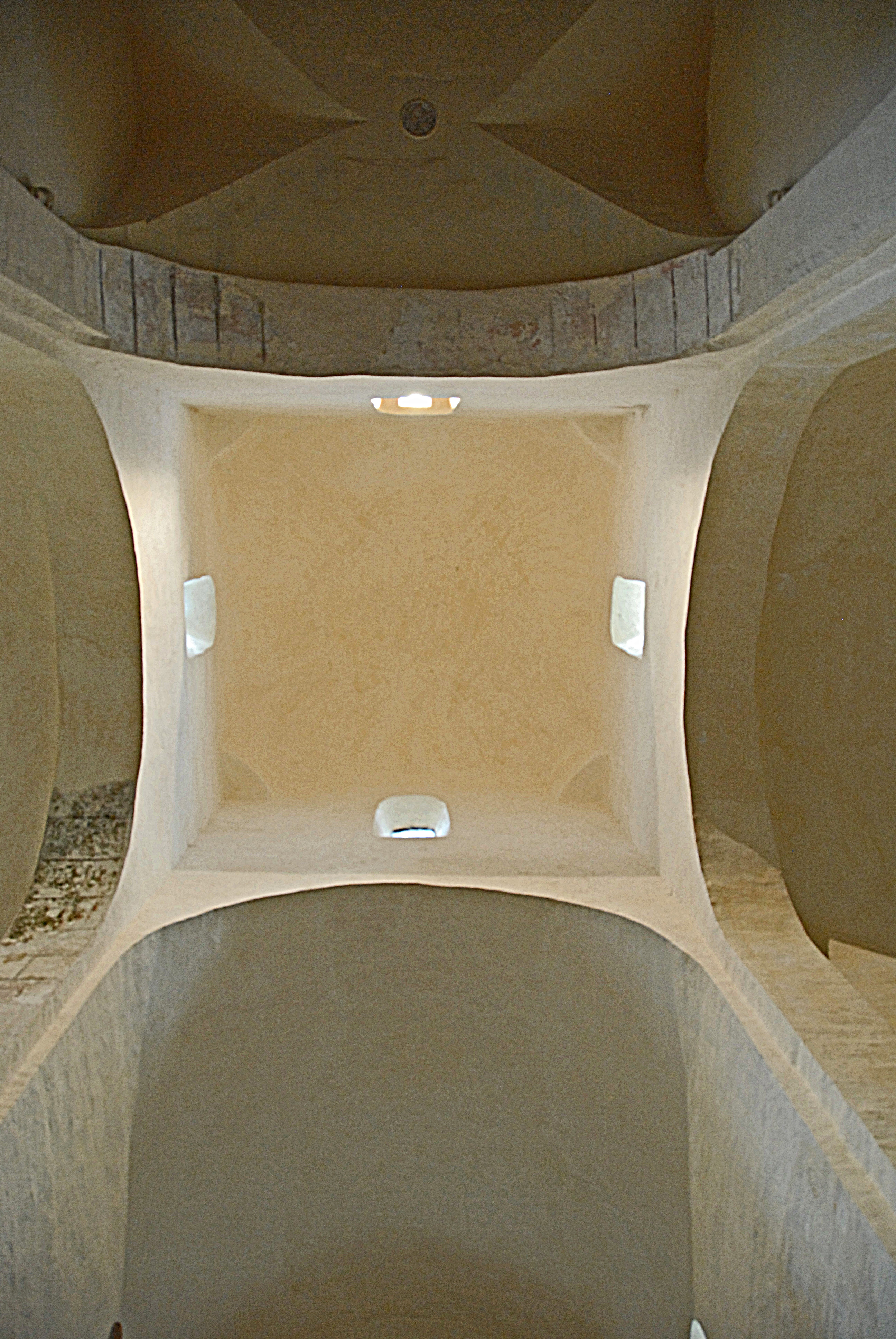 Châtillon-s-S, Vierungskuppel von unten